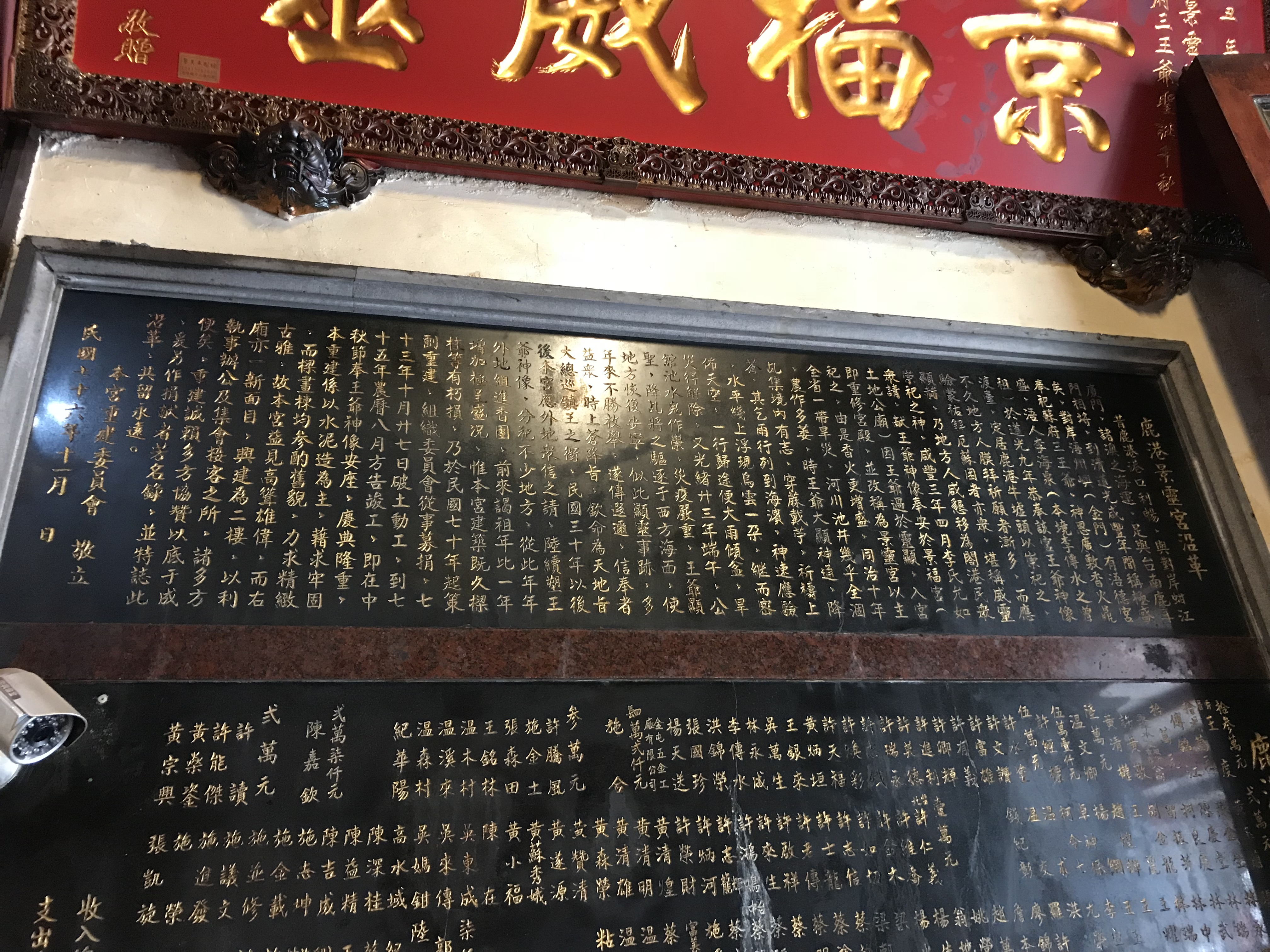 鹿港景靈宮沿革